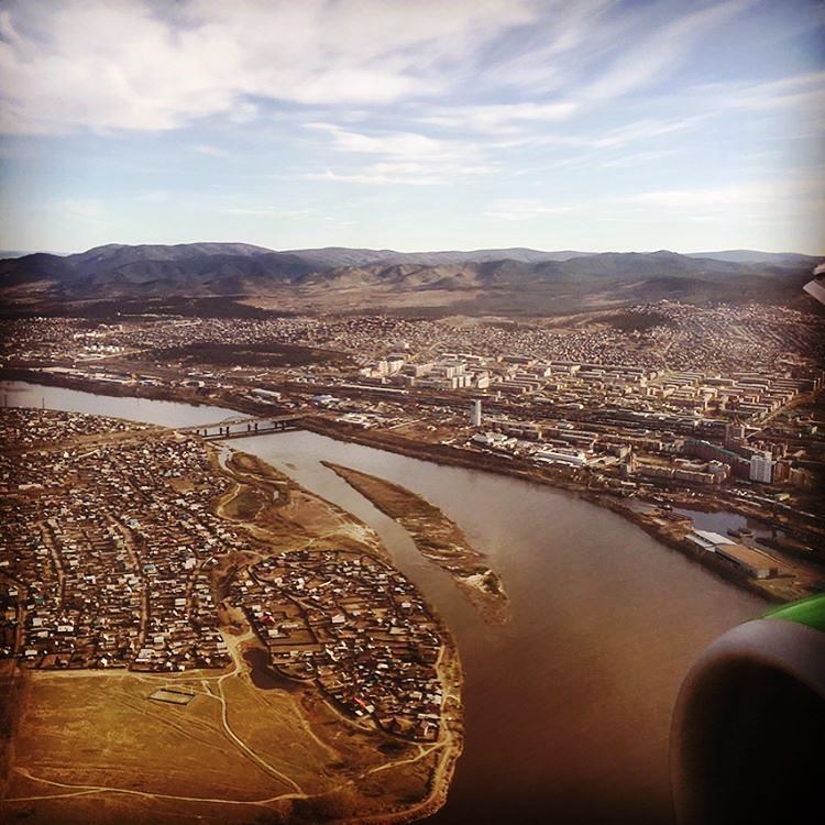 The bridge across the Selenga River in the city of Ulan-Ude